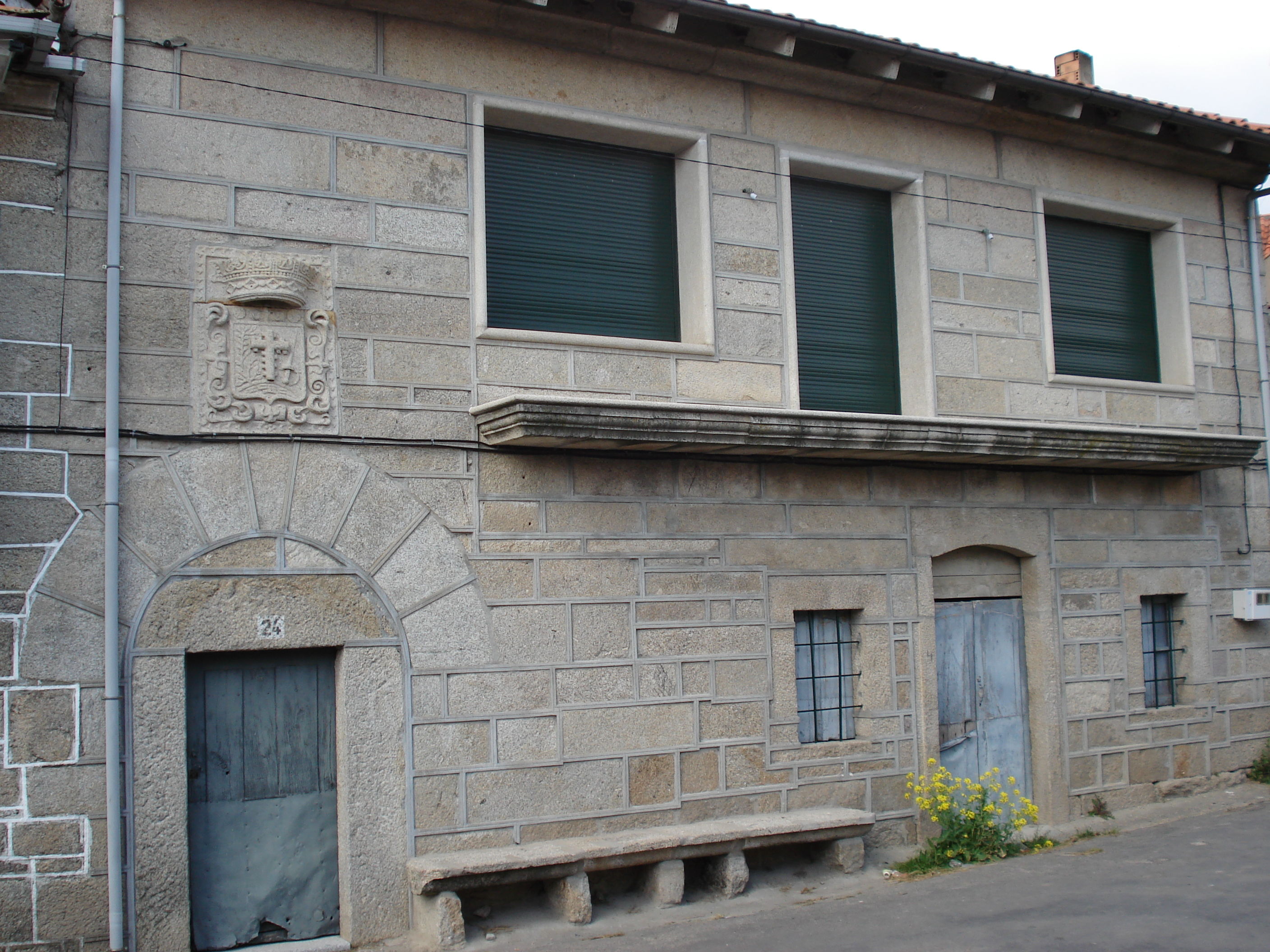 Casa con escudo de la inquisición en Videferre Oímbra